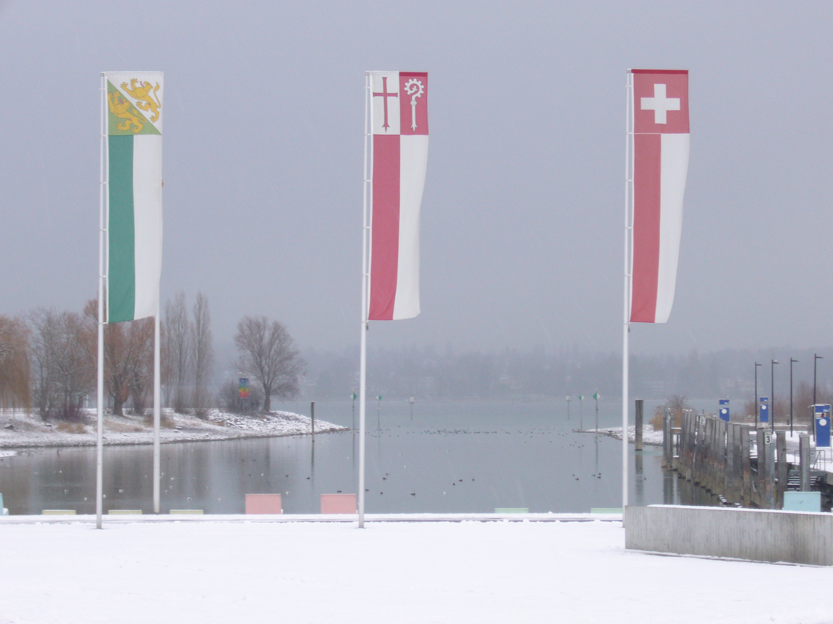 Fahne von Kreuzlingen am Hafen von Kreuzlingen